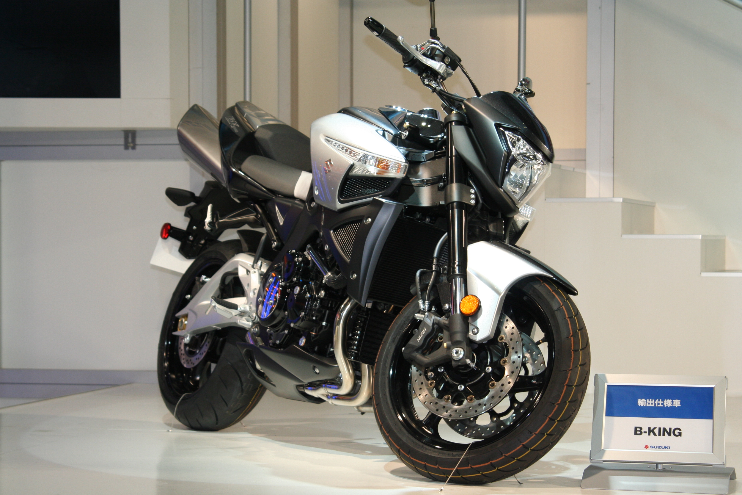 Suzuki B King